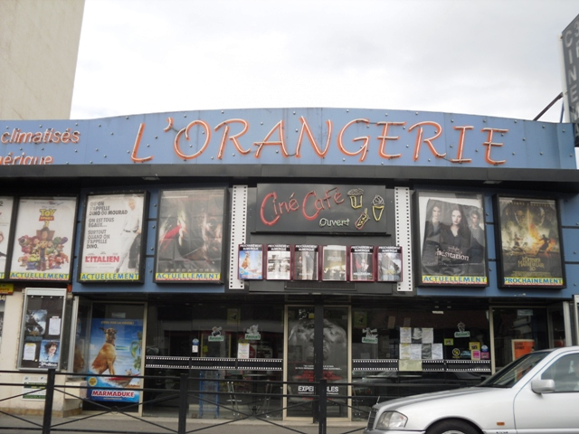 Le cinéma L'Orangerie de Draveil (91)